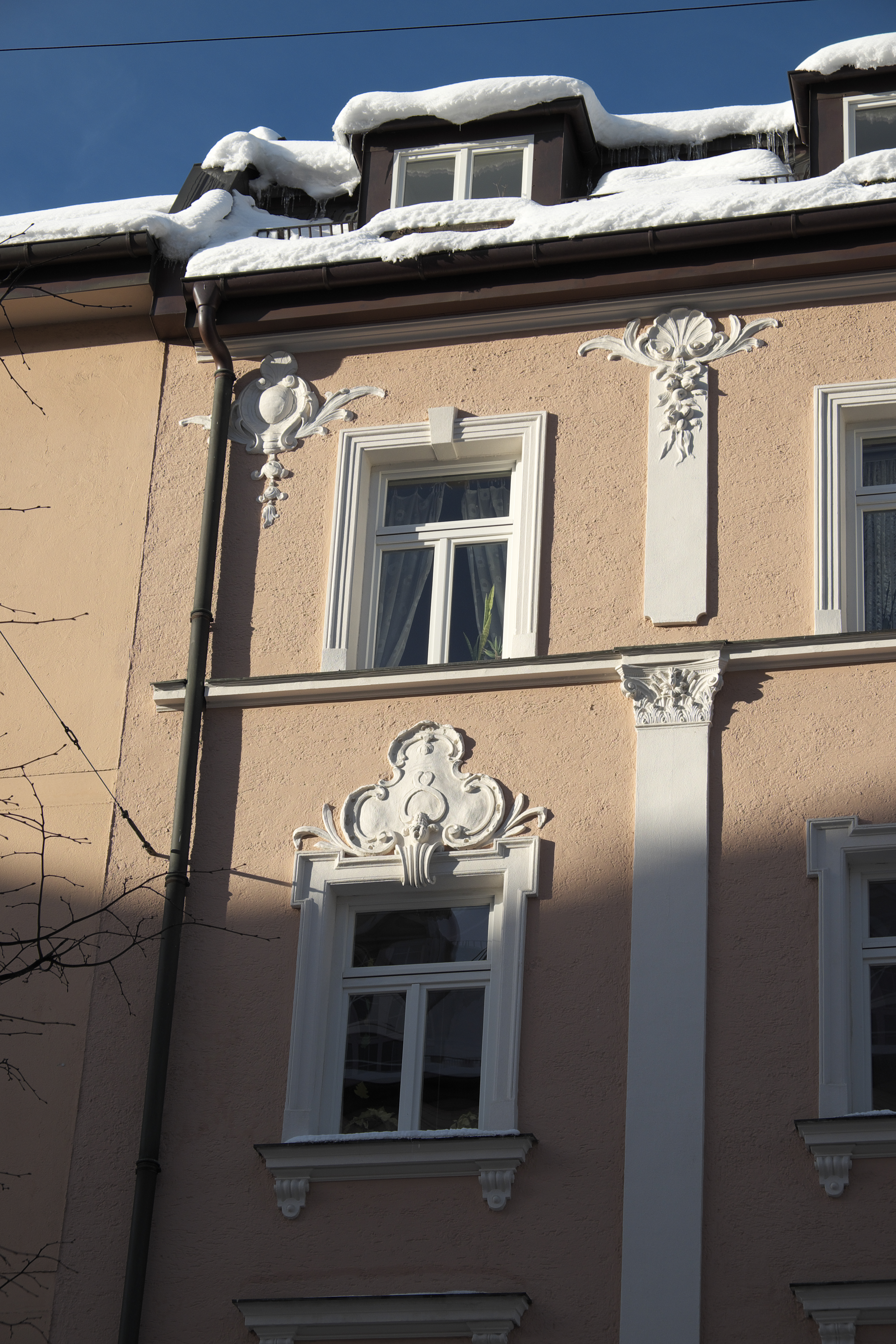 Mietshaus in der Belfortstraße 9 in Haidhausen im Stadtbezirk Au-Haidhausen in München (Bayern/Deutschland), um 1890/1900